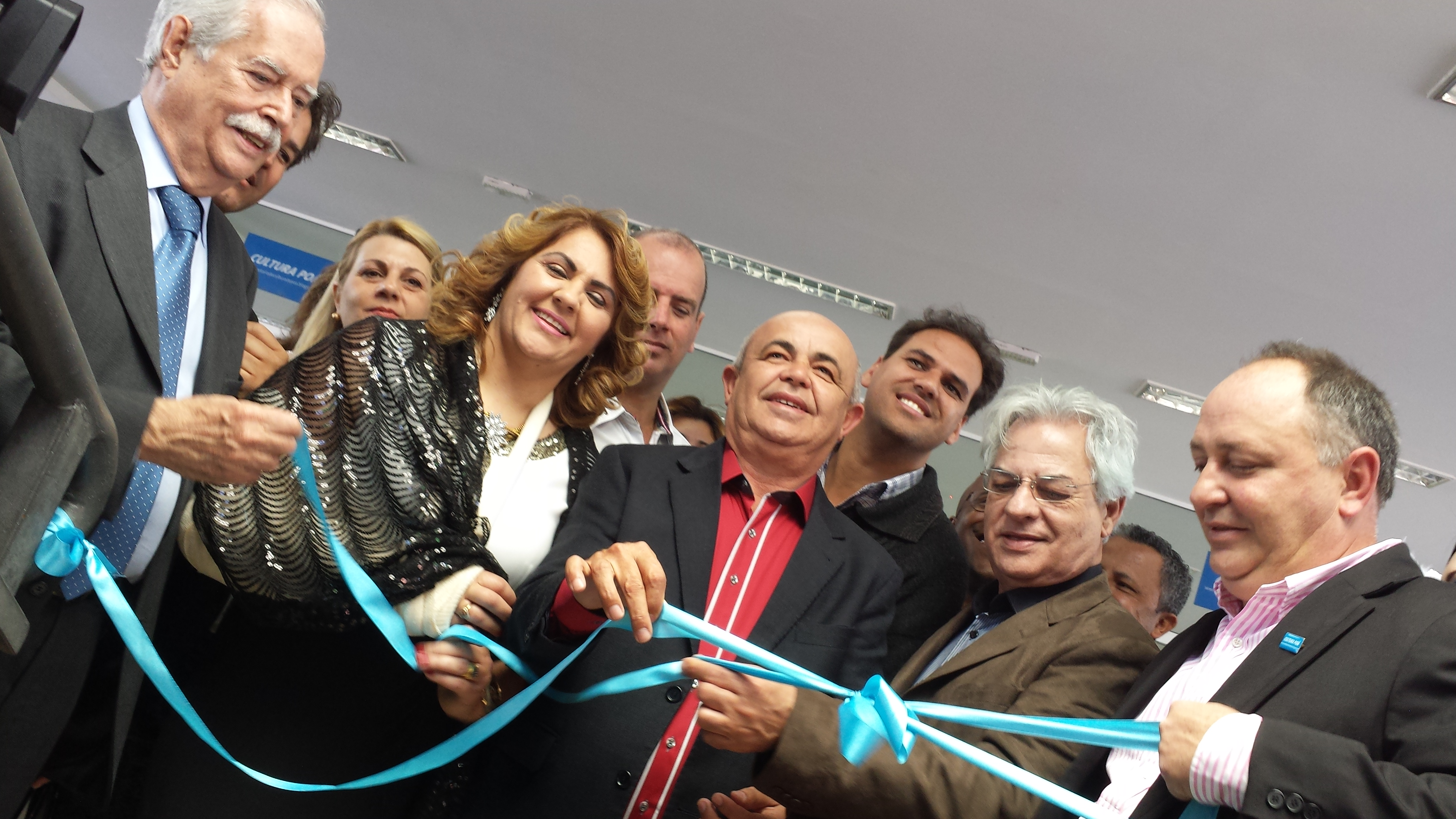 O prefeito de Poá e o vice-prefeito Marcos Borges na abertura da EXPOÁ 2013